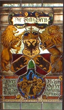 Kirchenfenster, ref. Kirche Bözen AG, Schweiz